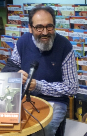 Presentació de Un Médico Novato a Llibreria Futurama l'11 del 12 del 13.